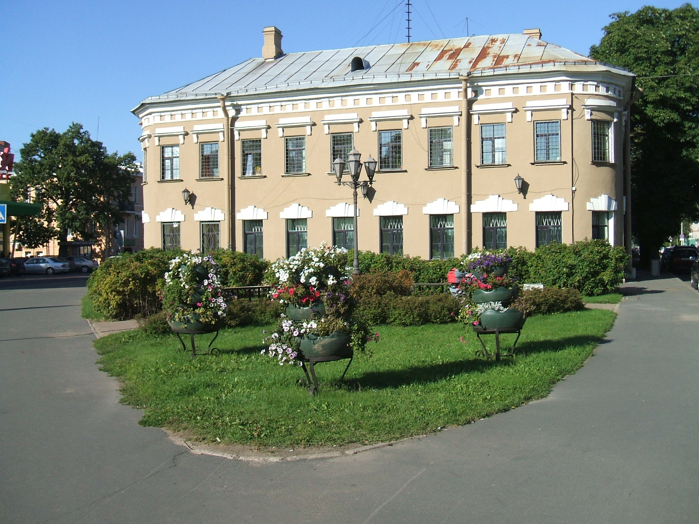 скверы Сестрорецка СПб